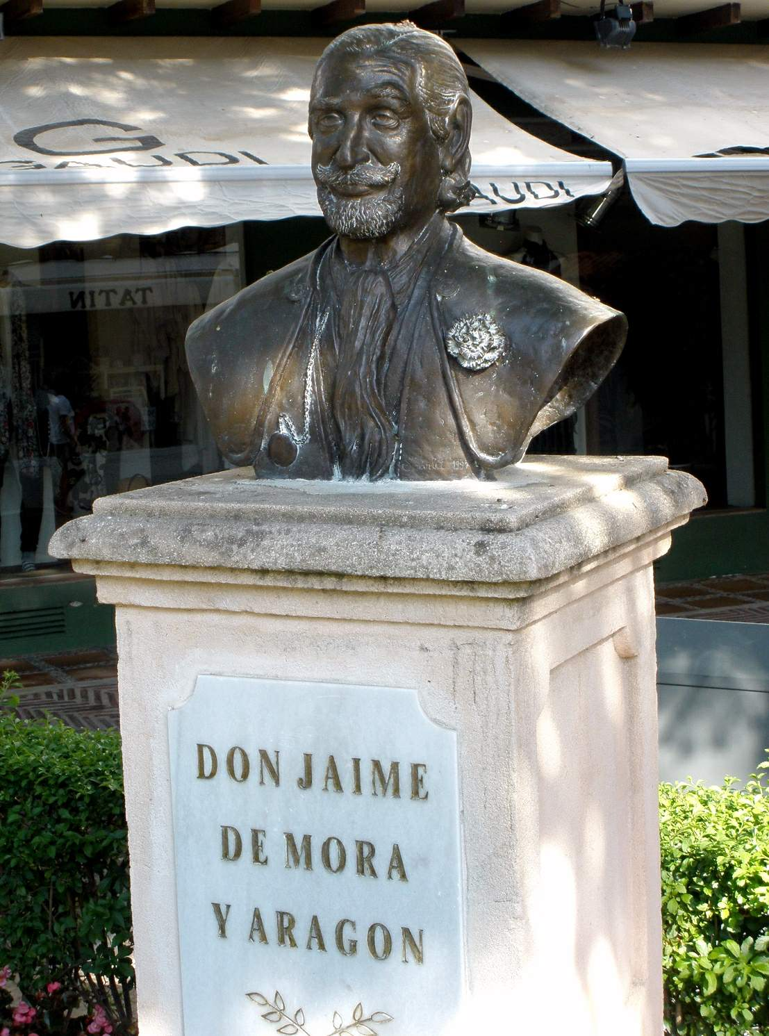 Plaza de la Victoria (Marbella). Busto de Jaime de Mora y Aragón